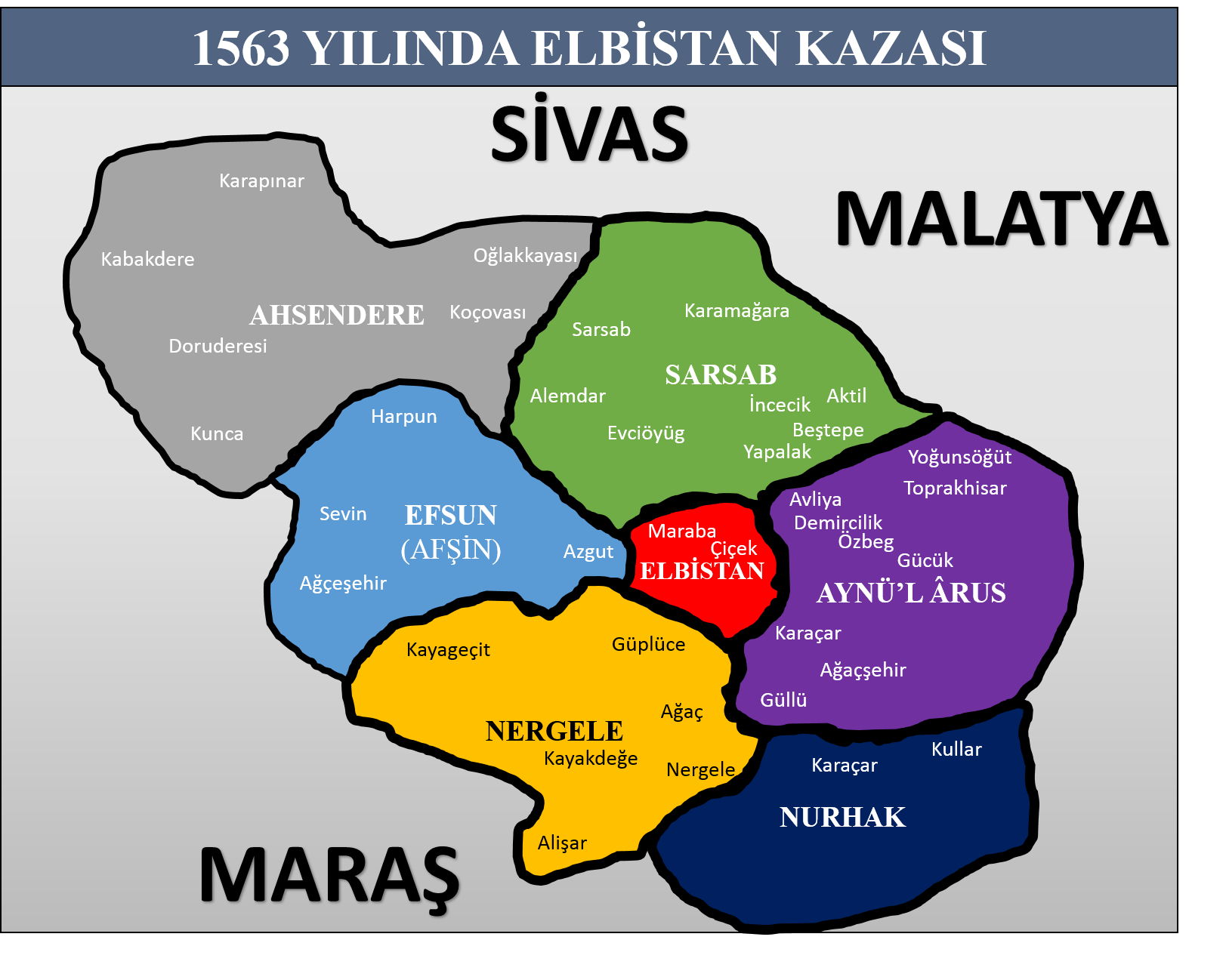 Elbistan Sancağı-1563 Yılı Verileri- Bu yazıdaki ve resimdeki veriler dikkate alınarak hazırlanmıştır